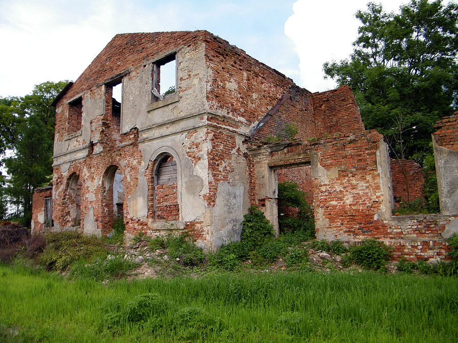 Ruiny dworu w Łaznowie tzw. Belweder rok 2010